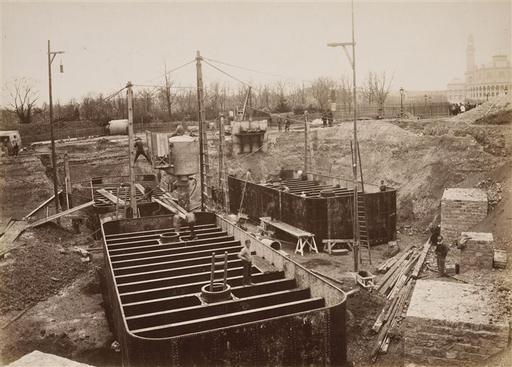 Musée d'Orsay Native nameMusée d'OrsayLocationParisCoordinates48° 51′ 36″ N, 2° 19′ 37″ E Established1986Website control VIAF: 130307757 ISNI: 0000 0001 2157 2575 ULAN: 500310001 LCCN: n84128587 NLA: 36024323 WorldCat Pierre Petit (1832–1909) Alternative namesPierre PetitDescription French photographer Date of birth/death18321909Location of birth/deathAups, FranceParisWork period1848 – 1908Work locationFrance, New York (Statue of Liberty)Authority control VIAF: 100987556 ISNI: 0000 0000 8008 6705 ULAN: 500028356 LCCN: n87810036 GND: 174256957 WorldCat Don de la famille Granet en 1981 Hauteur : 0.282 m Largeur : 0.389 m